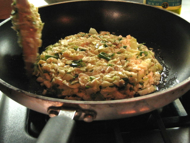 Okonomiyaki